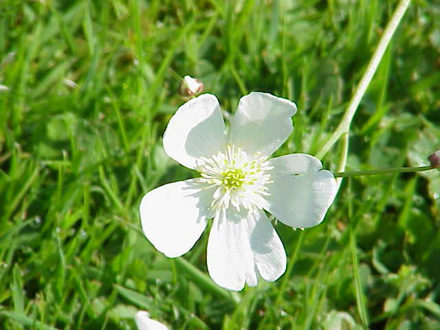 Species: Ranunculus aconitifolius Family: Ranunculaceae Image No. 1